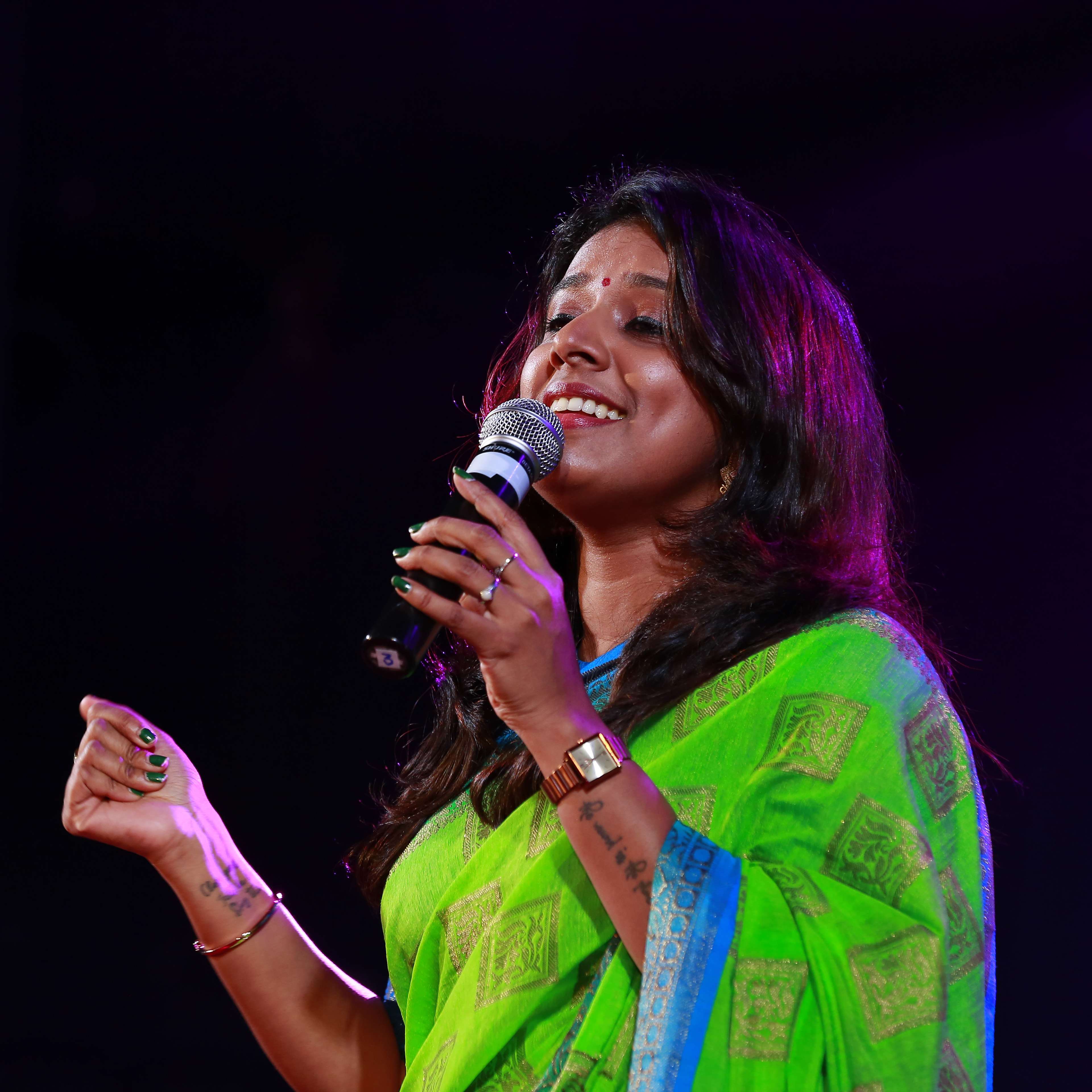 Depicted person: Sithara Krishnakumar – Indian singer